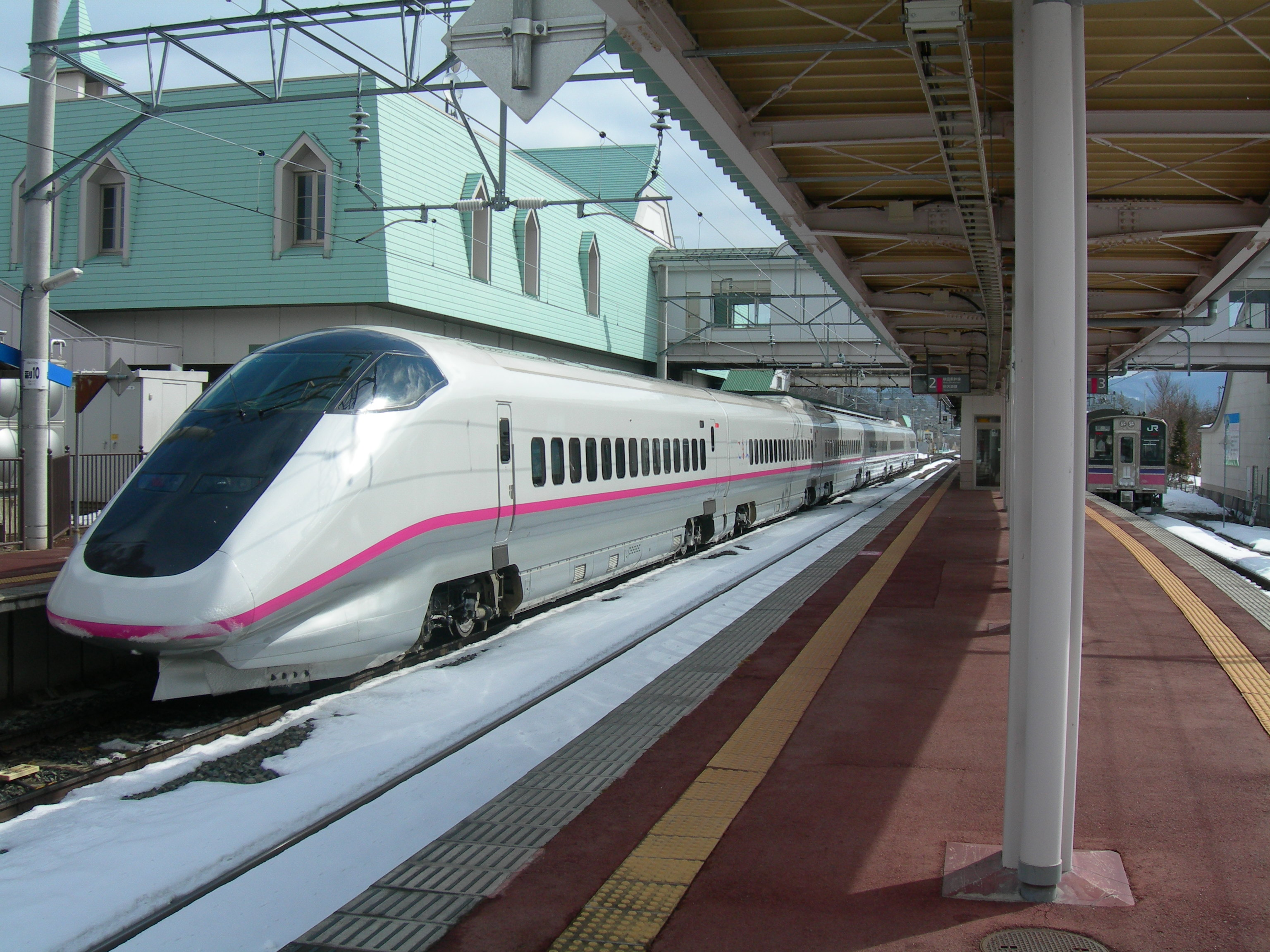 雫石駅ホーム